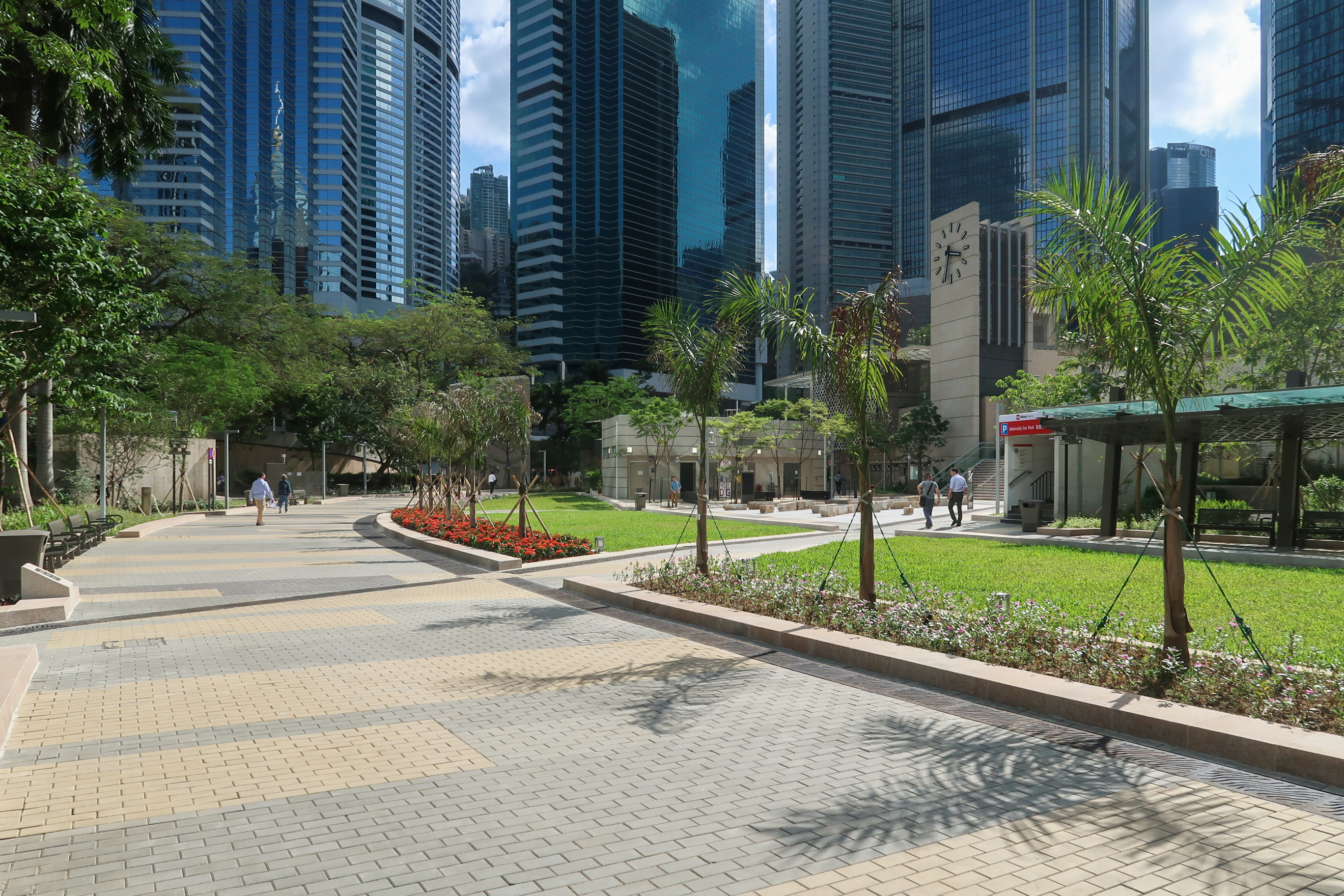 Harcourt Garden